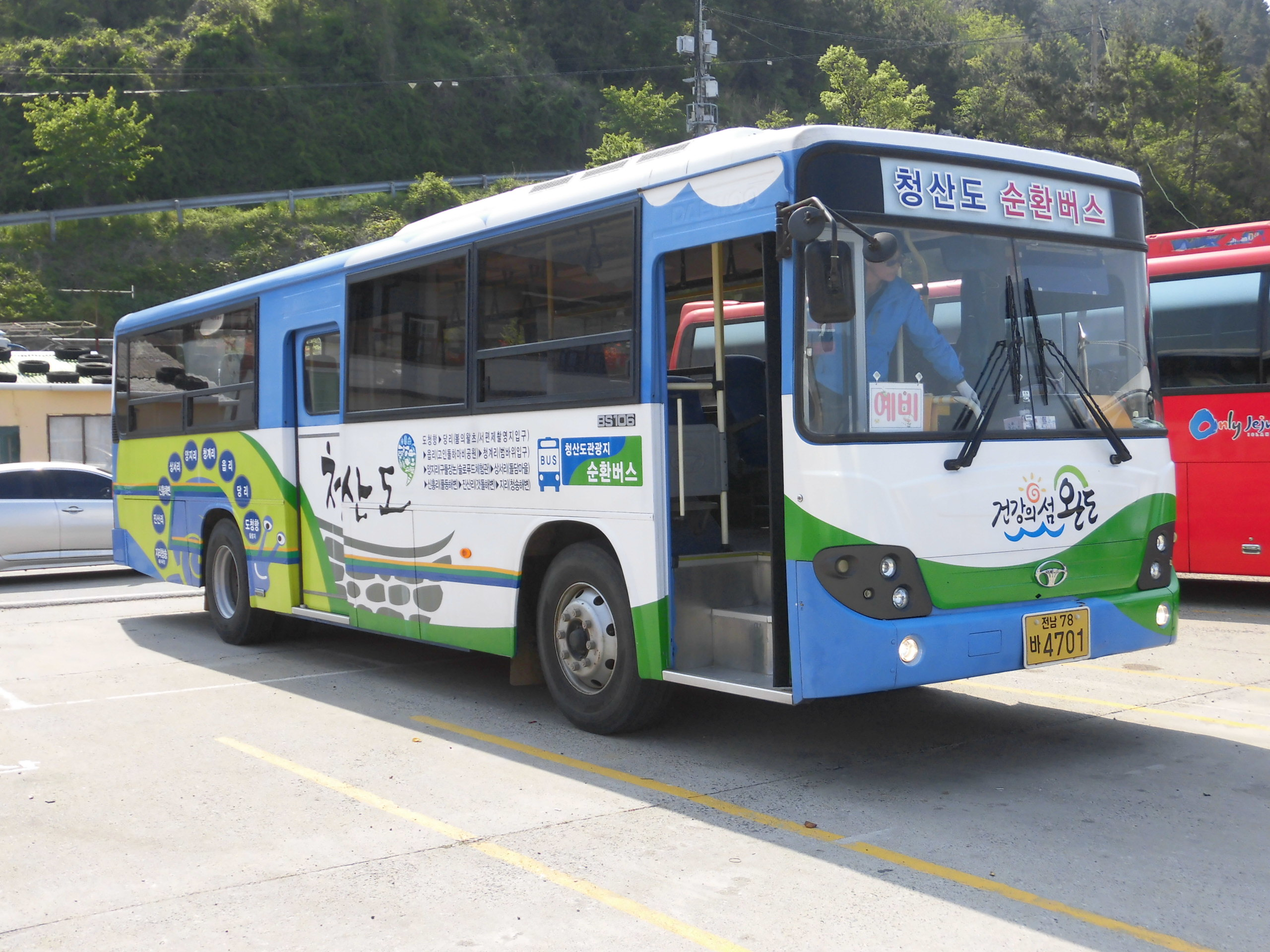 청산도 순환버스